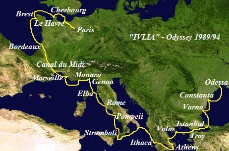 На этом фотоснимке из космоса, который я взял на Викискладе, я отразил маршрут путешествия на диере "Ивлия".